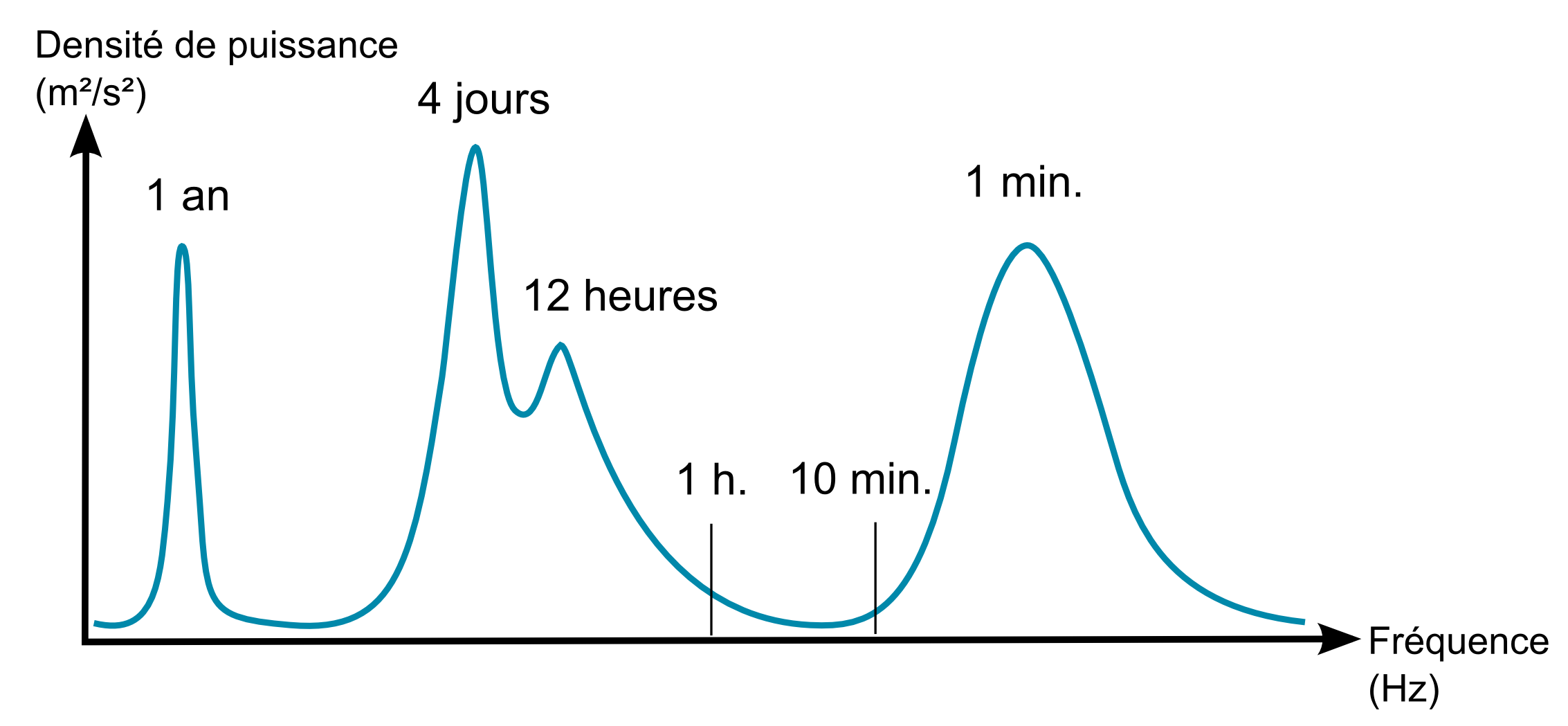 Spectre de Van der Hoven, Analyse spectrale de la vitesse du vent dans la couche limite turbulente. Représentatif d'un vent horizontal à 100m au dessus du sol.